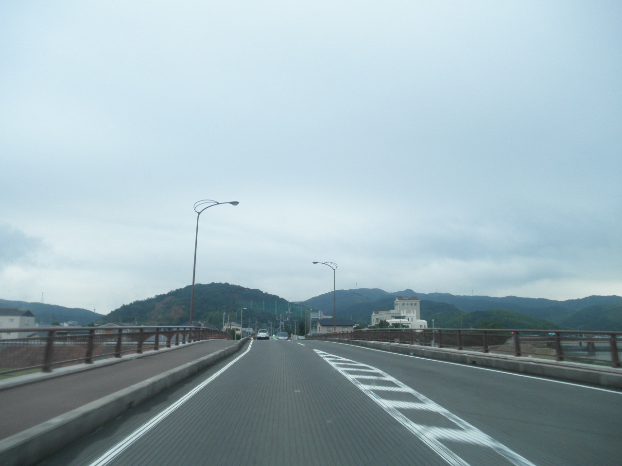 徳島県阿南市横見町中川原 徳島県道27号阿南那賀川線